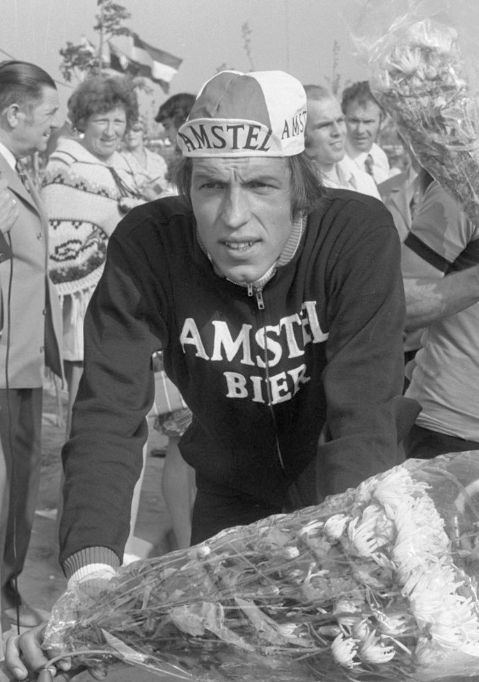 Ronde van de Haarlemmermeer 1972